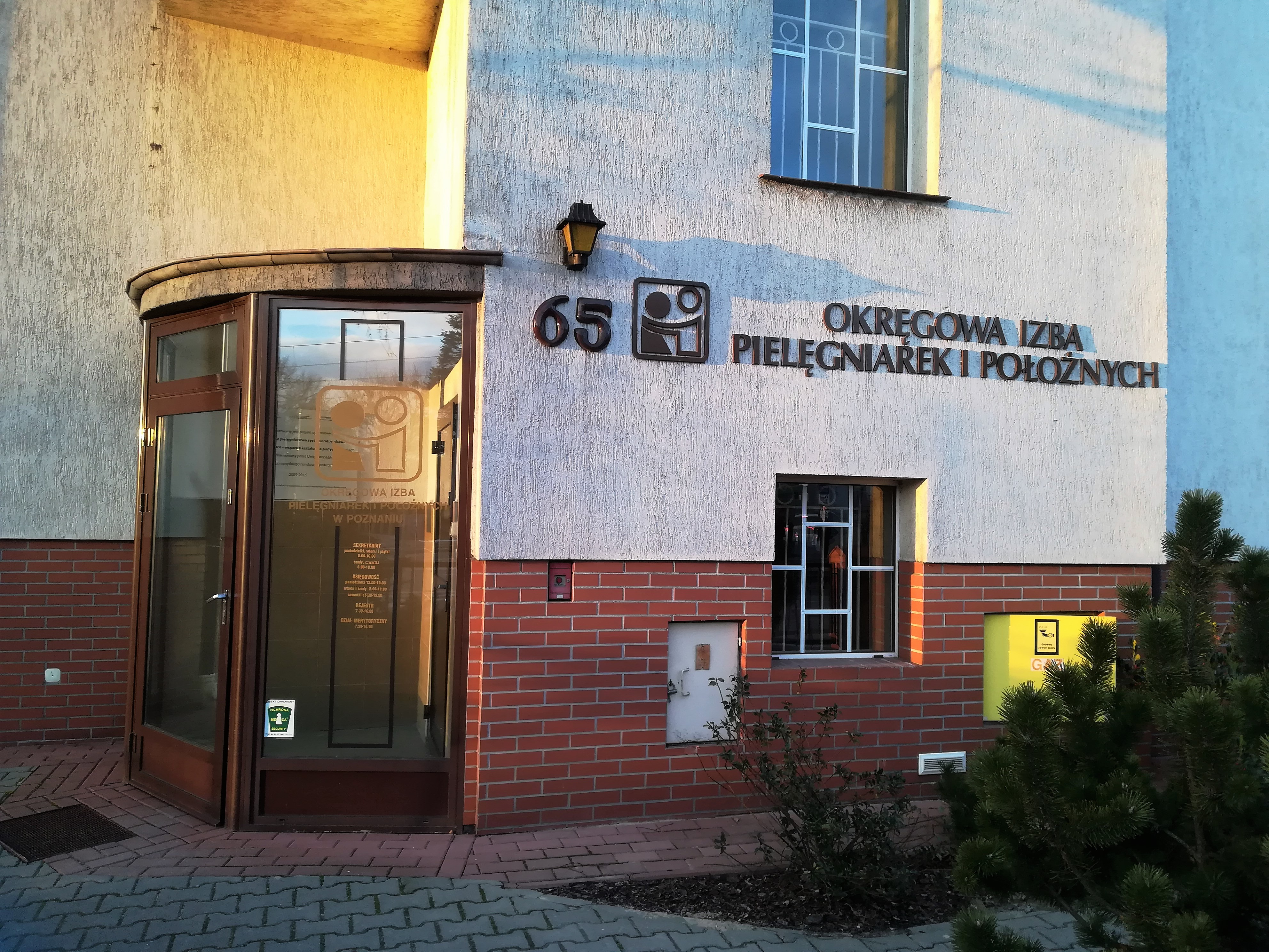 Okręgowa Izba Pielęgniarek i Położnych - Poznań, ul. Grunwaldzka.